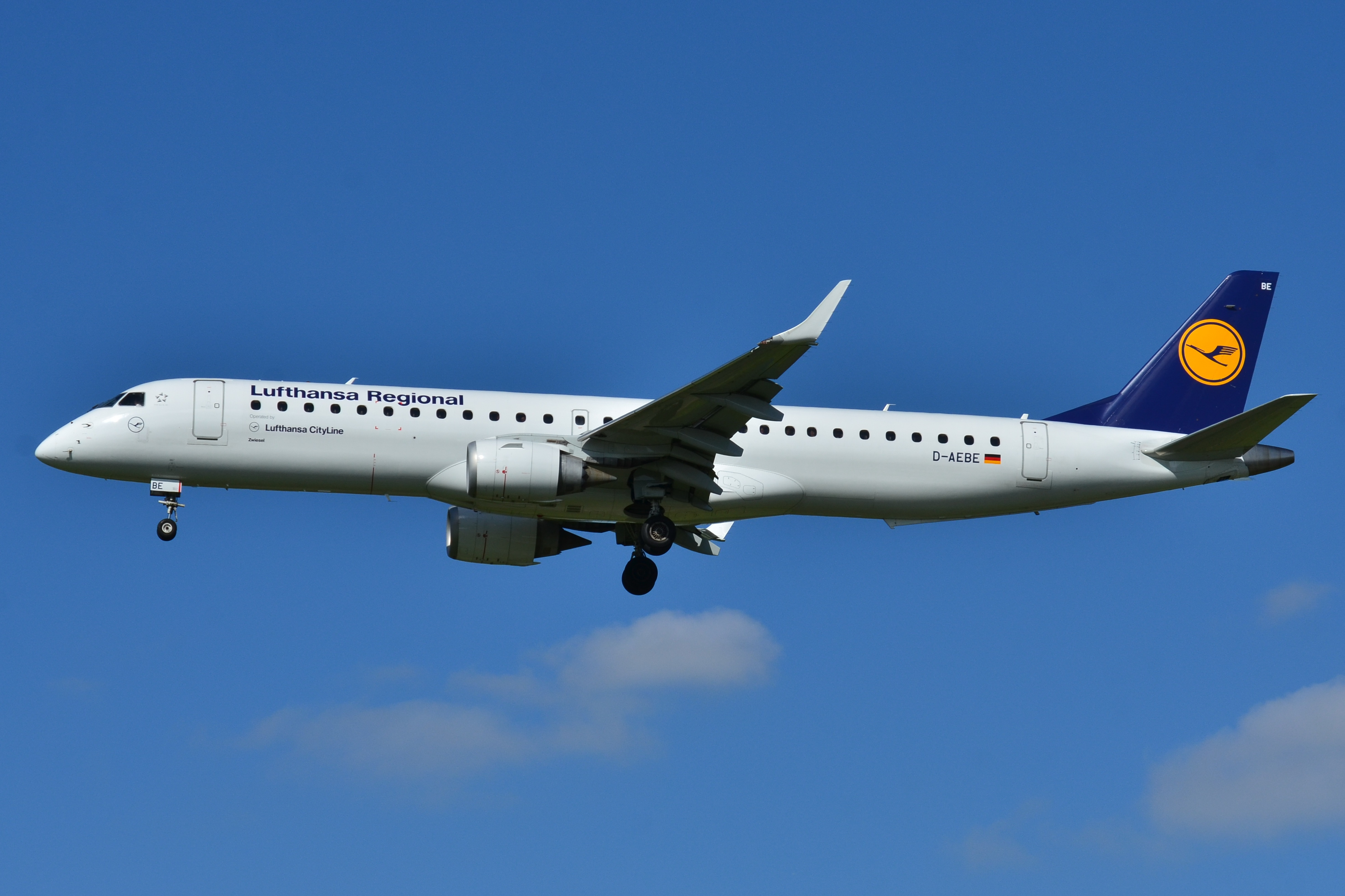 Photo prise à l'aéroport de Toulouse-Blagnac (LFBO) en France. Picture take at Toulouse-Blagnac Airport (LFBO) in France.